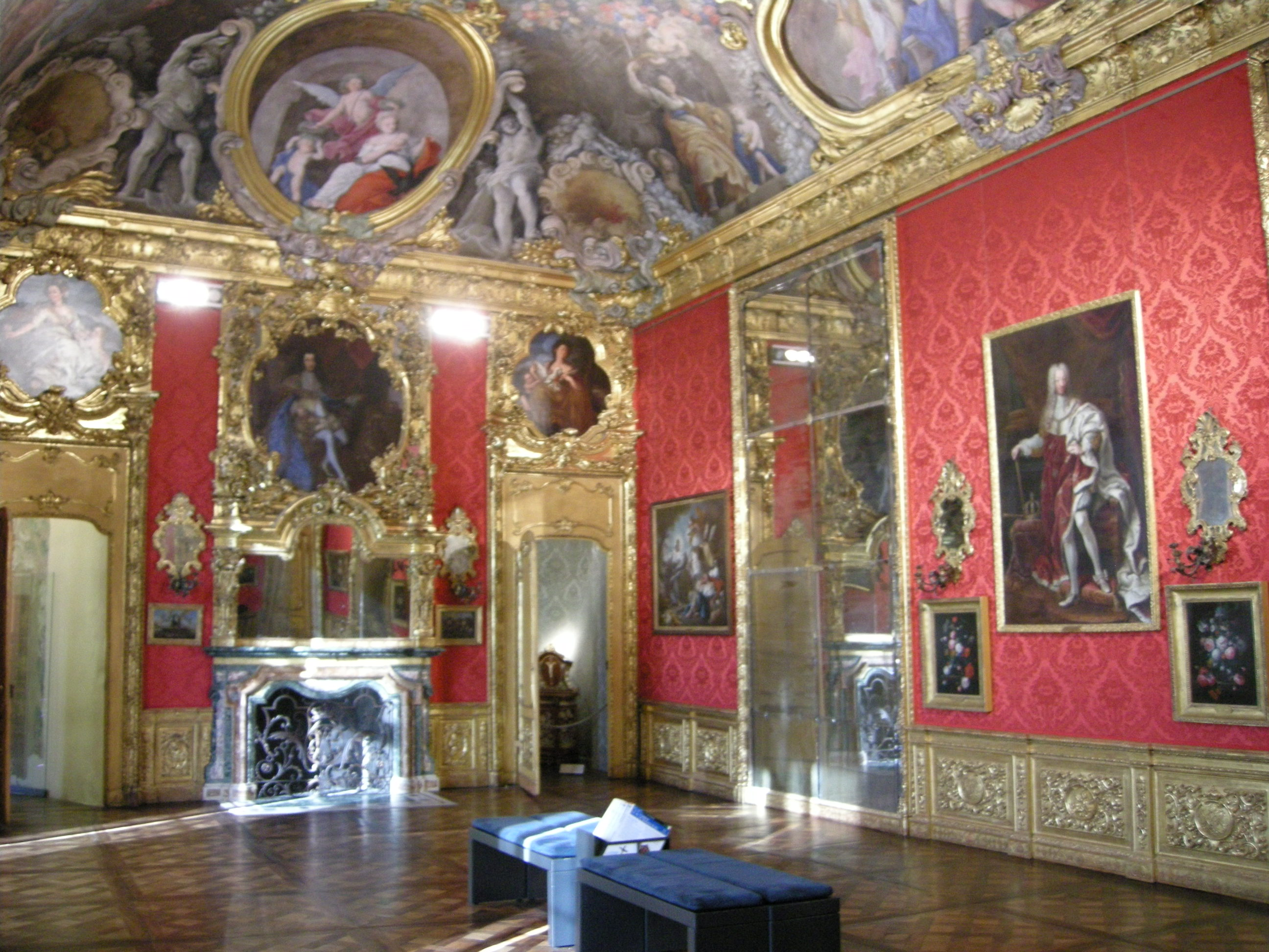 Palazzo madama torino, piano nobile